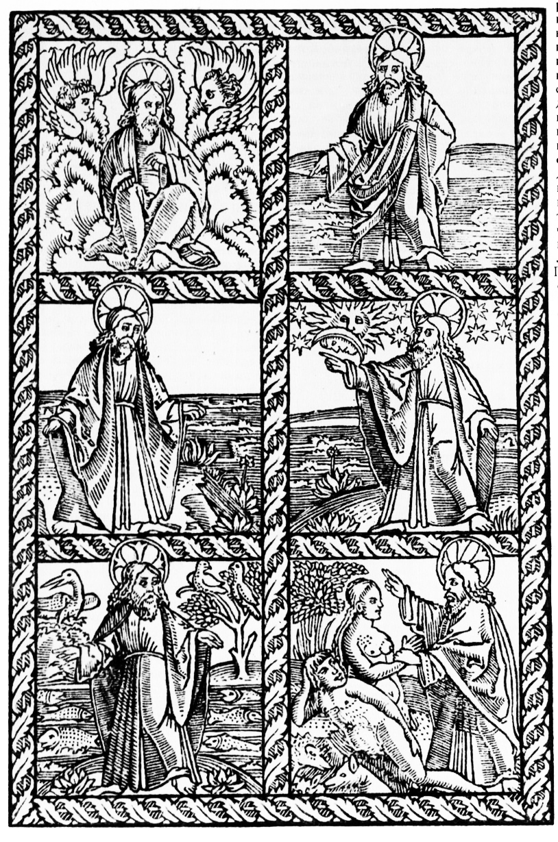 Францыск Скарына. "Стварэнне свету" ("Шэсць дзён светабудовы"). Первыя книги Моисеовы рекомыя Бытия (Кніга Быццё). Прага, 1519. Л. 8 аб. 161Х106 мм.